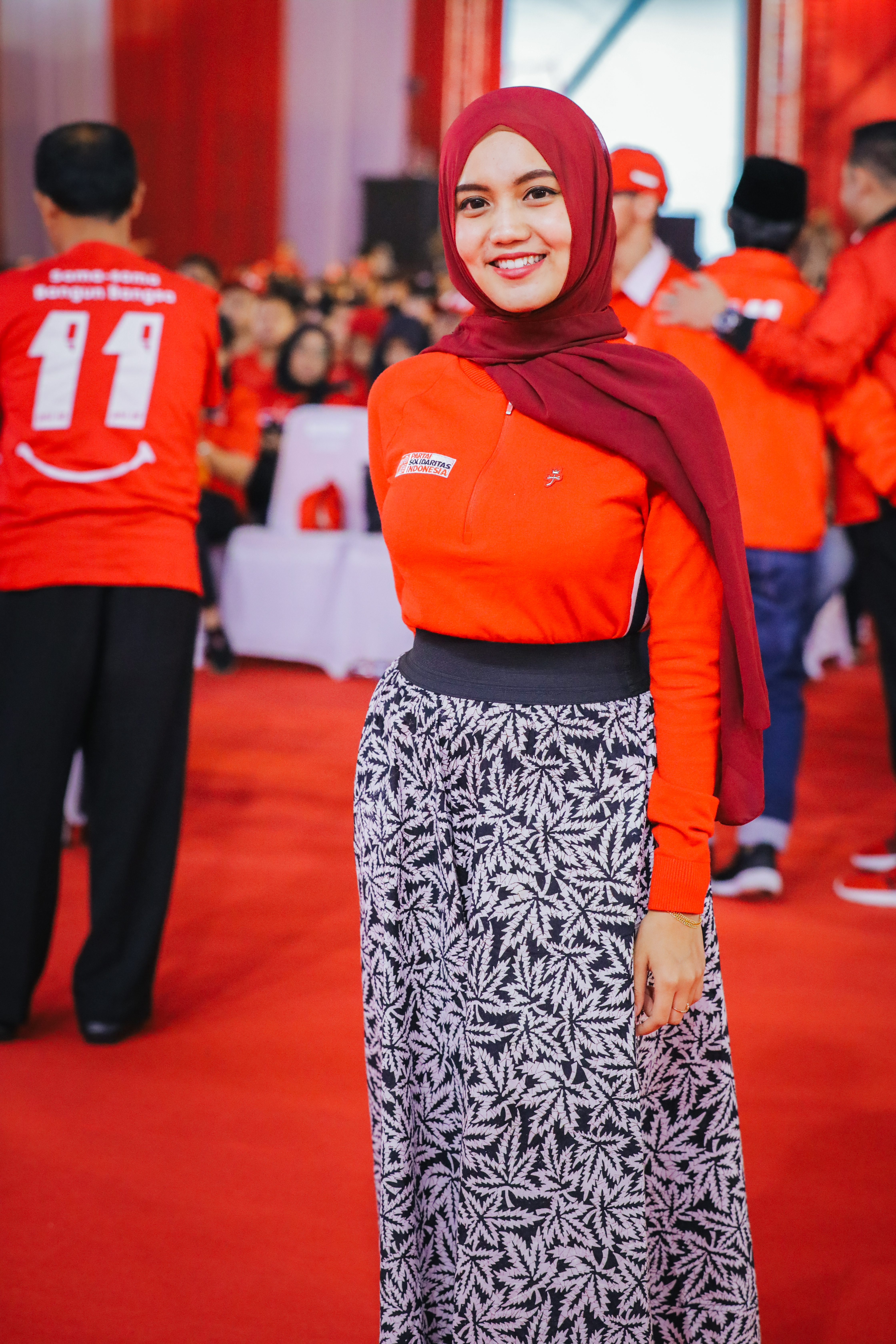 Caleg DPR RI PSI Sumatera Utara III